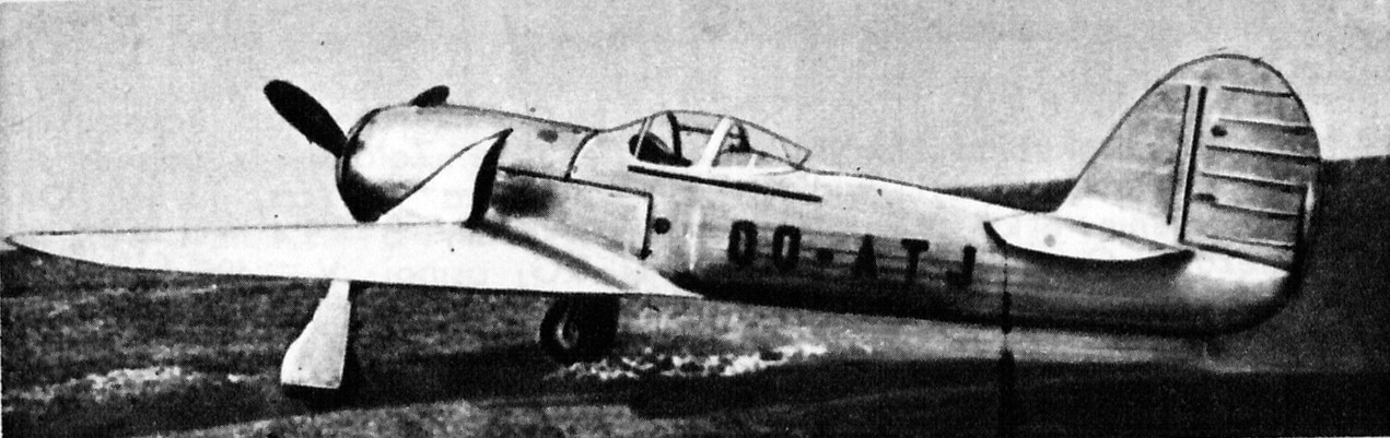 Belgijski samolot myśliwski Renard R.37.